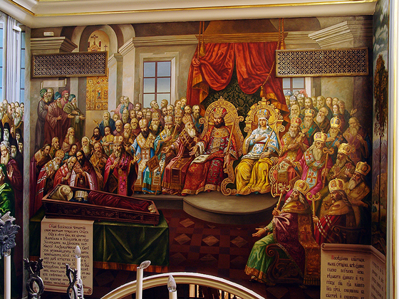 Четвертый Вселенский Собор.(Халкидонский собор) Роспись в Успенском Соборе Киево-печерской Лавры. Художники